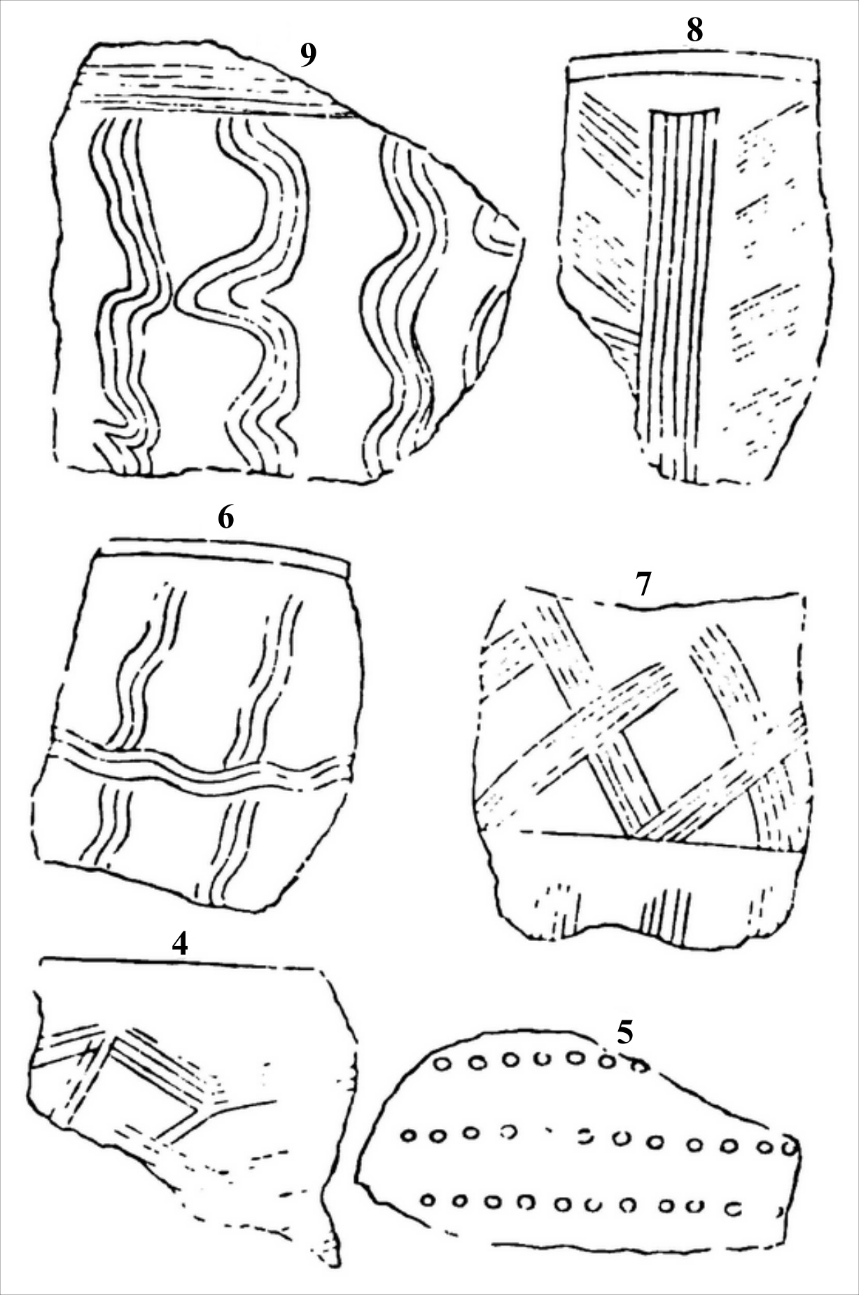 Skizzen der Scherbenfunde am Burgwall Körzin (Rundwall/Ringwall bei Stücken), gezeichnet und beschrieben von Hermann Busse. Beschreibung: "Die Fundstücke ..., bestehend aus slavischen Scherben (Fig.4, 6-9), ... , auch Hirsch-Geweih (Fig. 5), ..."